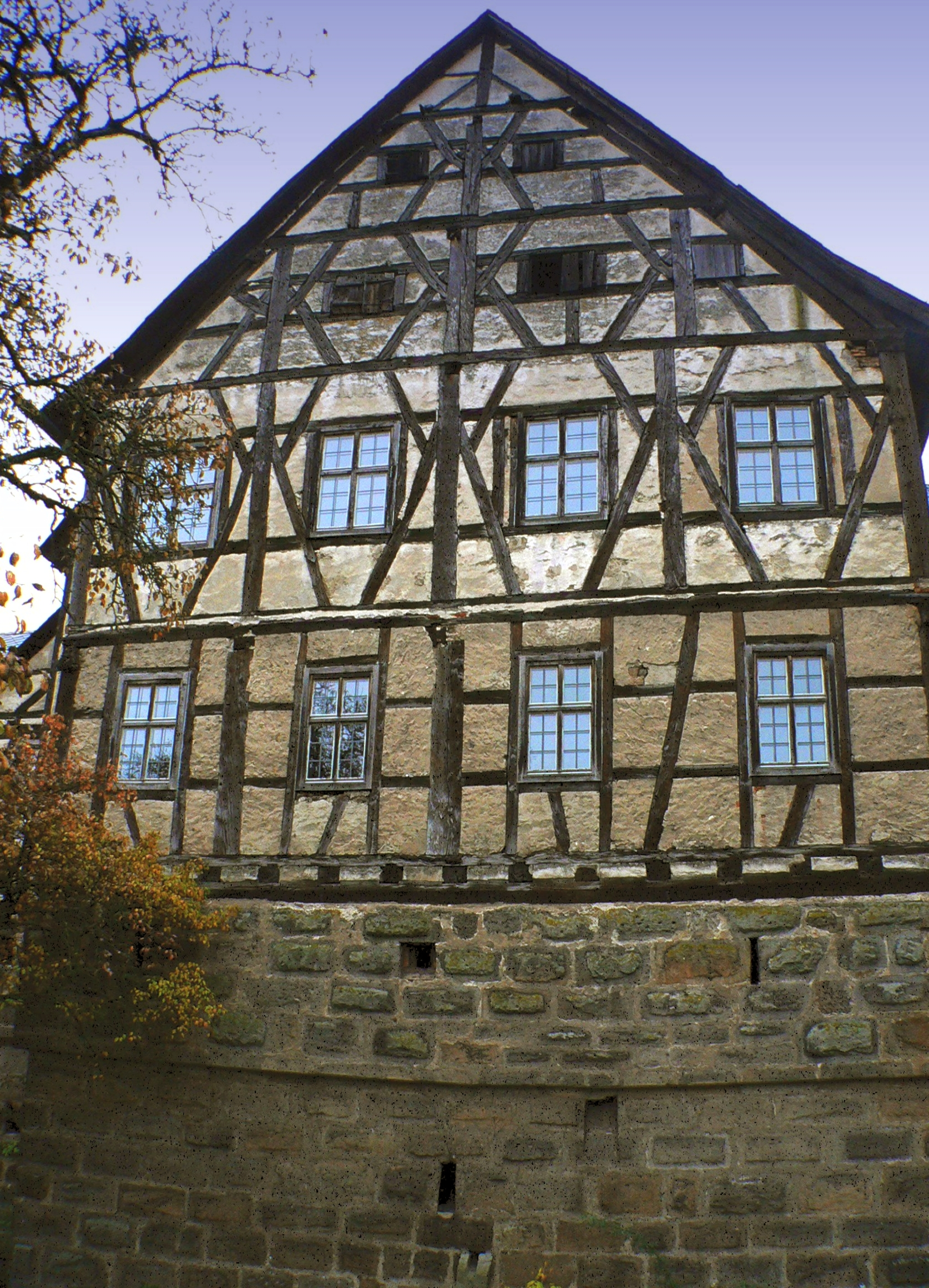 Schloss Ebelsbach, Palas